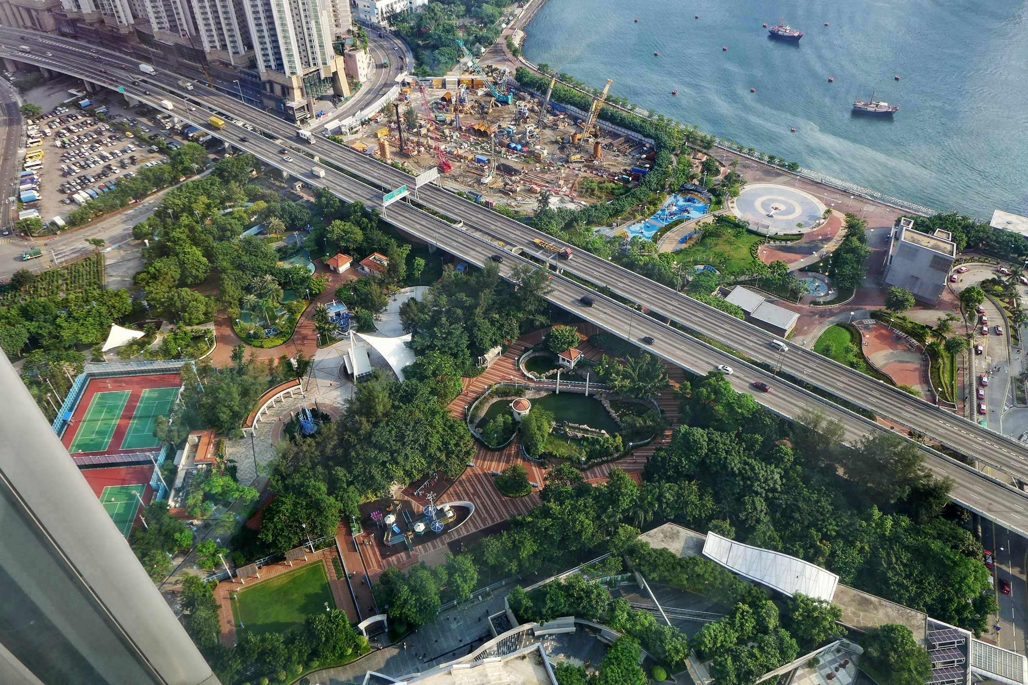 Tsuen Wan Park